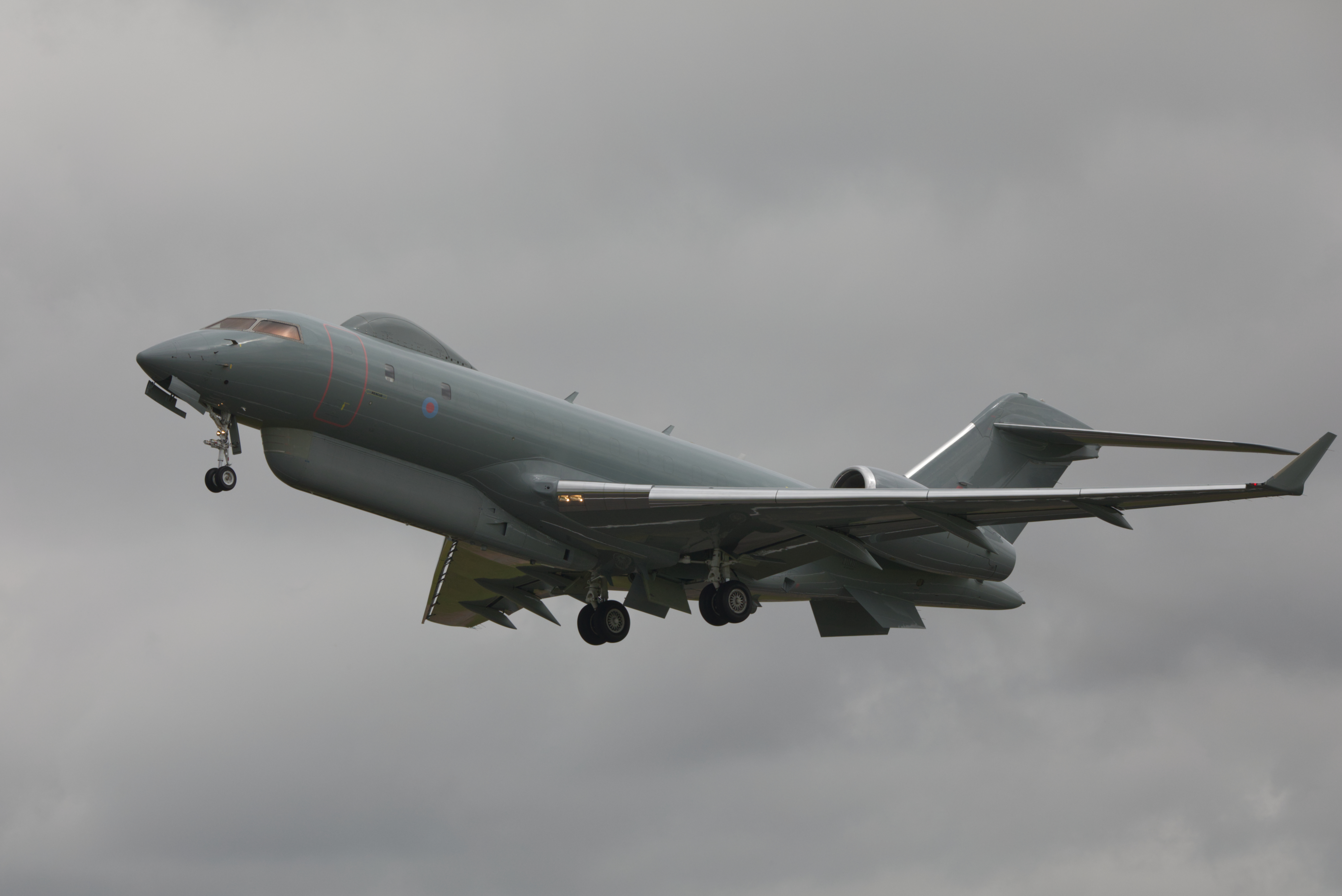 Bombardier Sentinel R1 ZJ684 5D4_4062